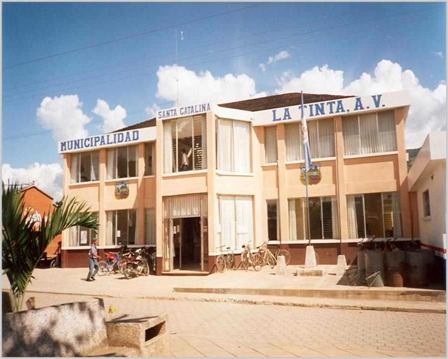 foto de la municipalidad de Santa Catalina La Tinta A.V.